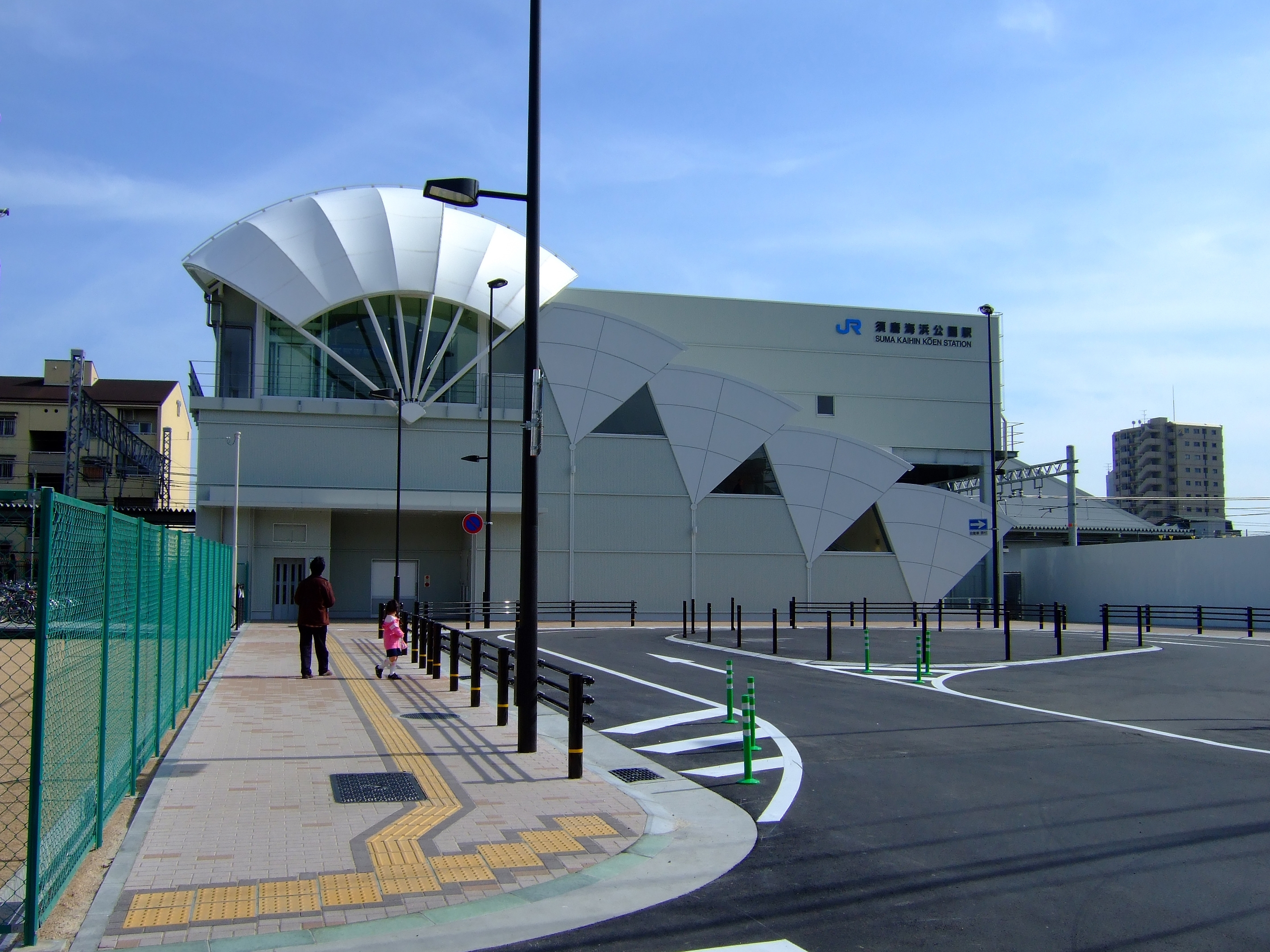 須磨海浜公園駅